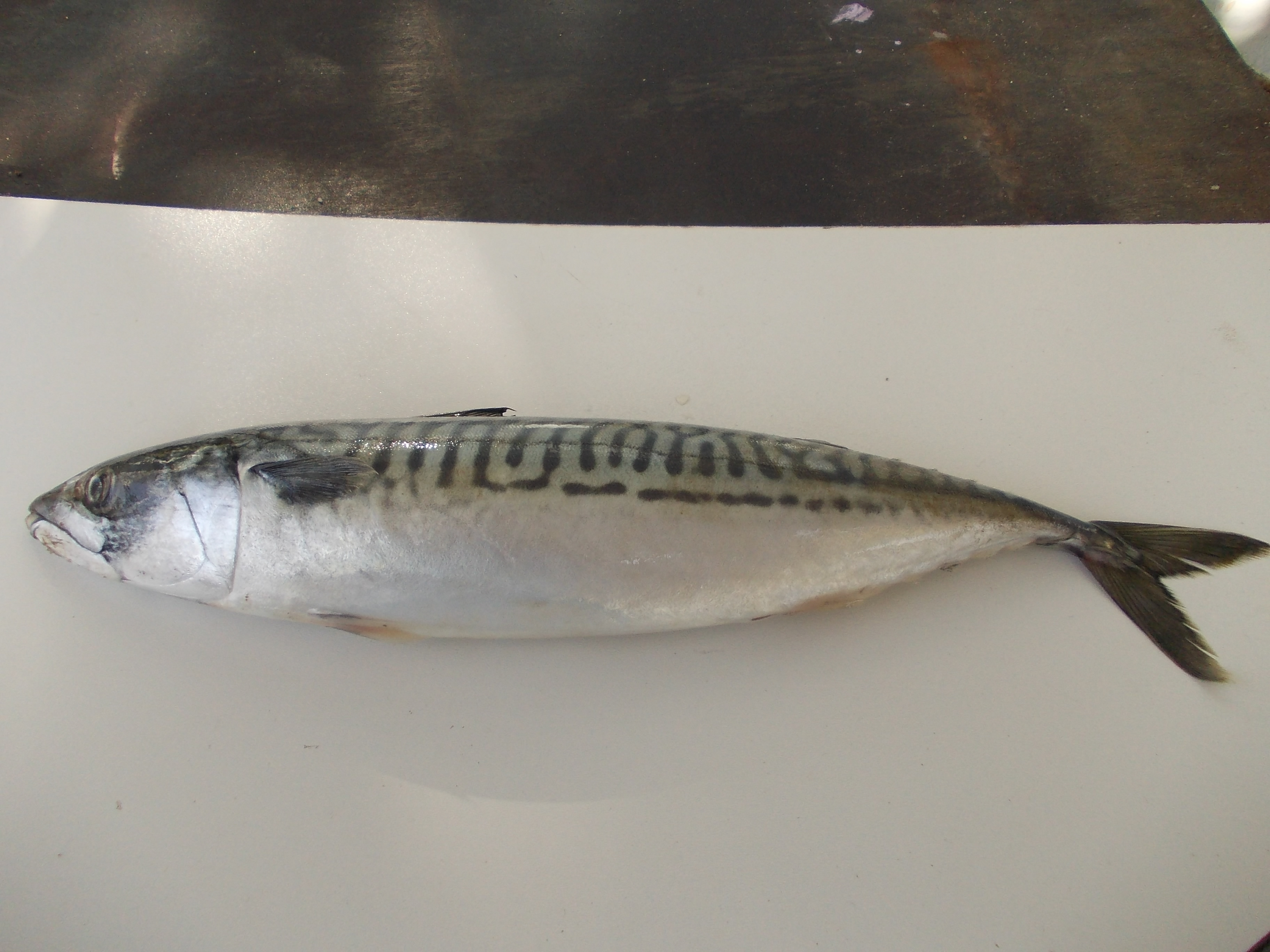 Macrou